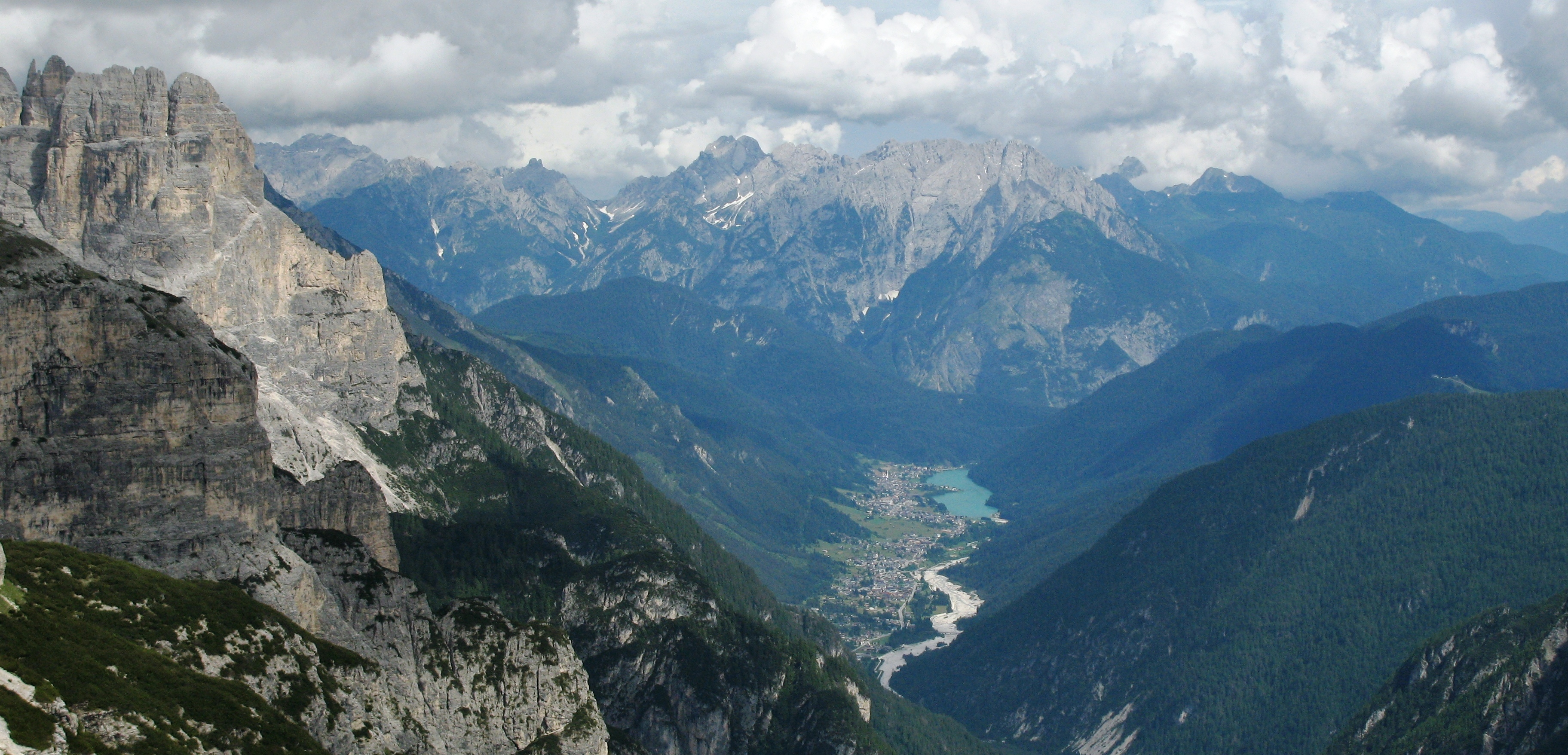 Aurozo di Cadore vun den Tre Cime de Lavaredo aus gesinn.